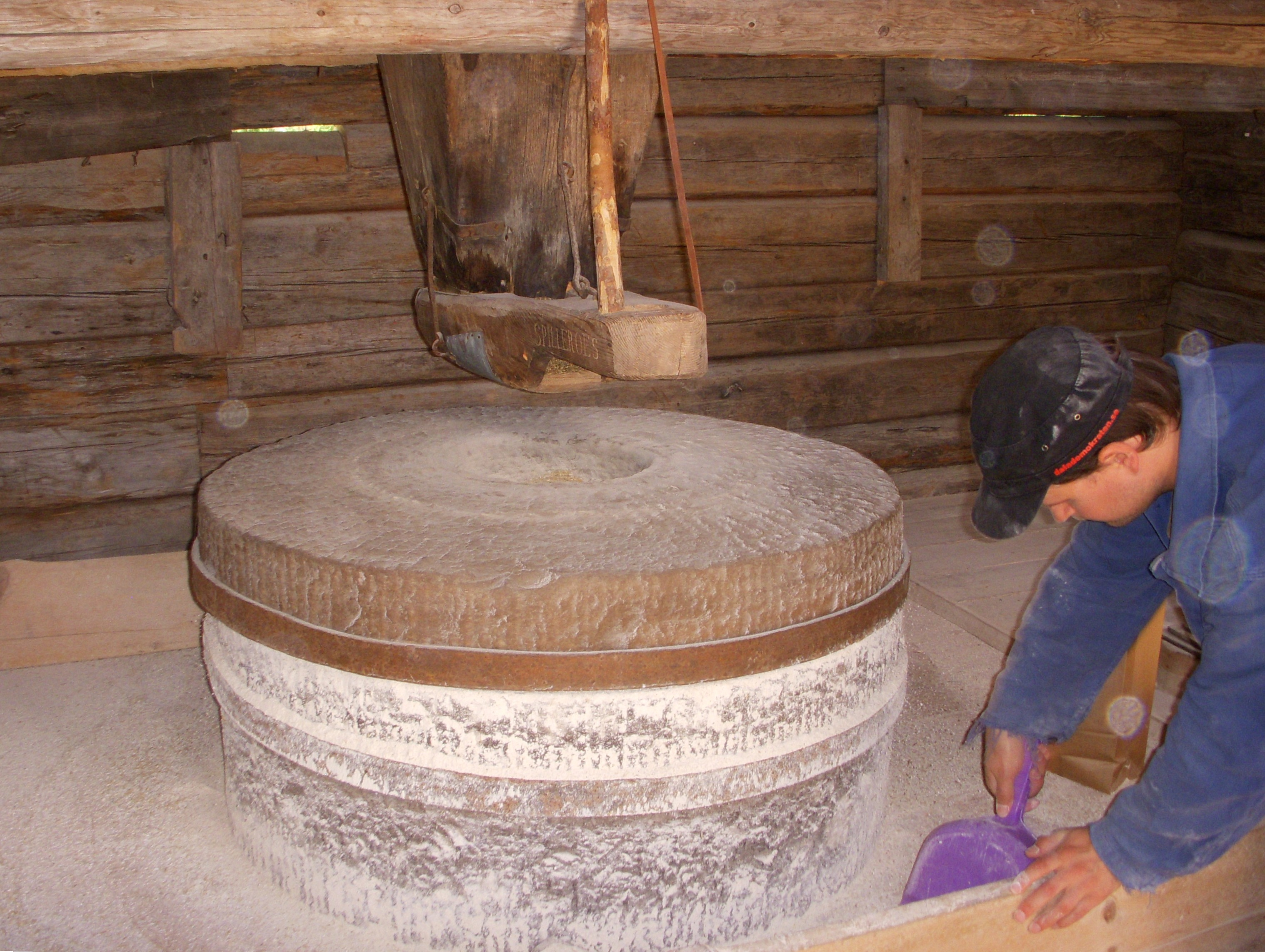 Detalj svaltkvarn, vid "Kvarna", Dala Floda